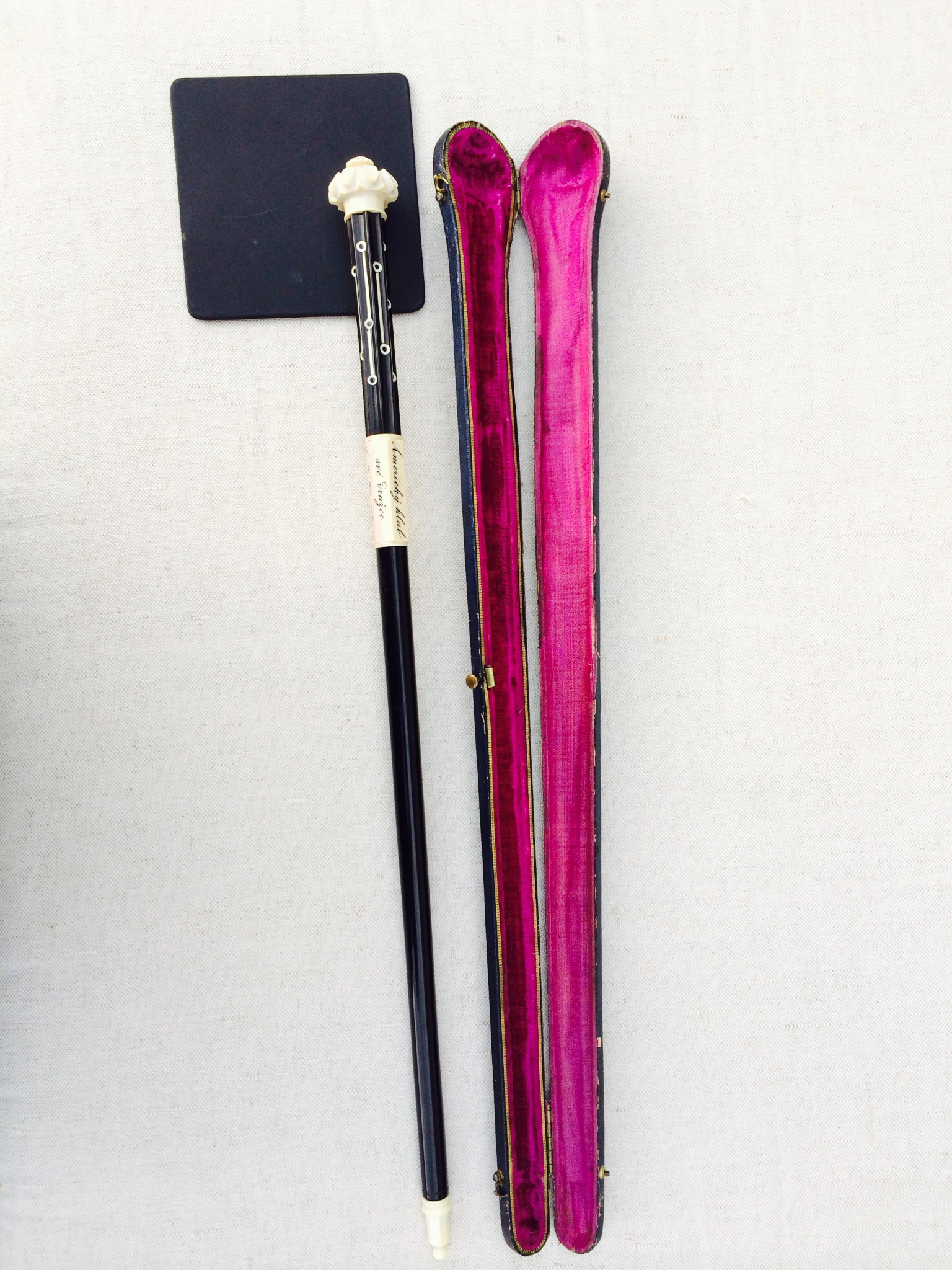 Památní ozdobná taktovka, kterou dostala Miloslava Pippichová-Havelková od Amerického klubu dam za dirigování pěveckého sboru na slavnosti k odhalení pomníku Boženy Němcové dne 6. června 1869.